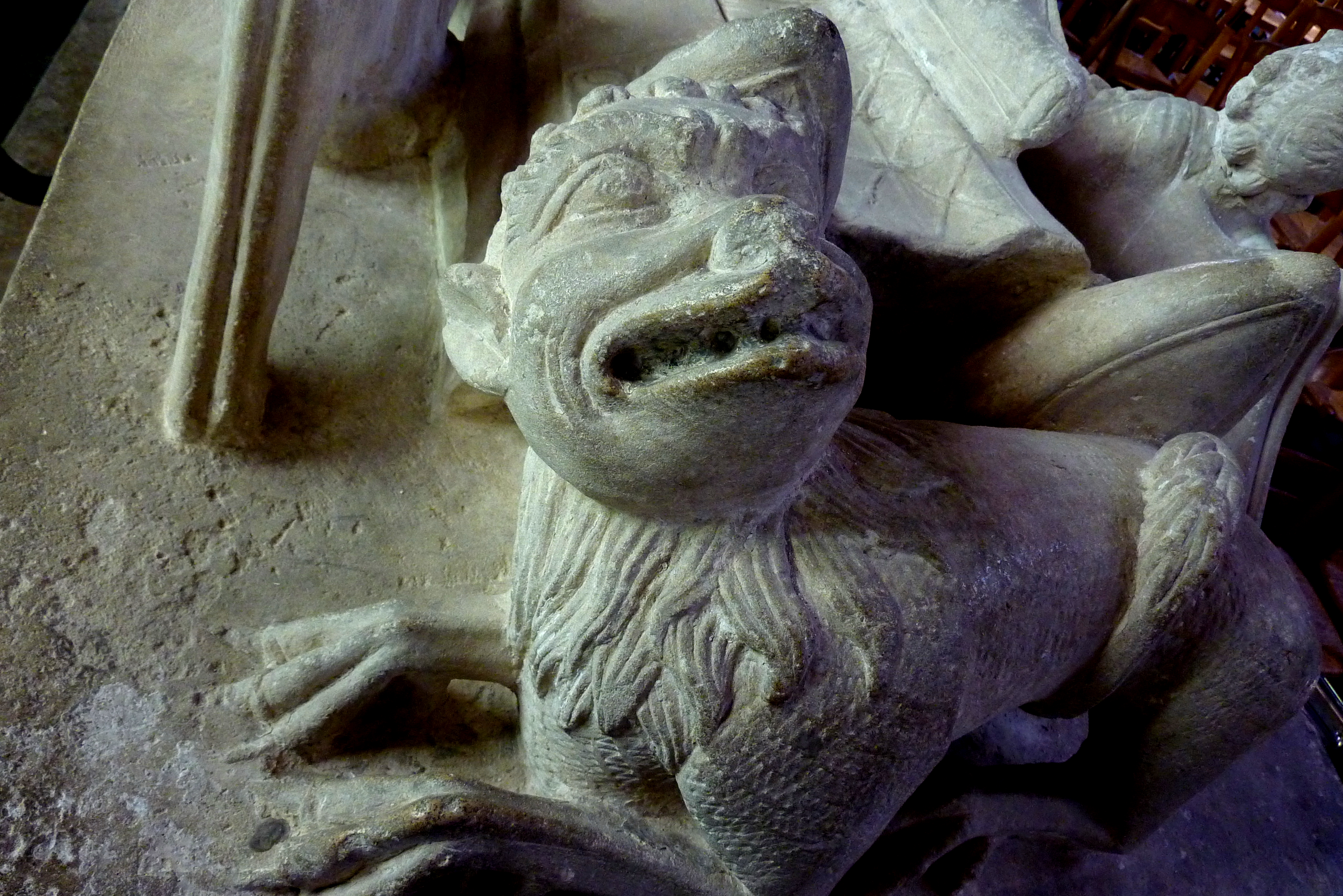 Grabmal des hl. Gautier in der katholischen Kirche Notre-Dame in Pontoise